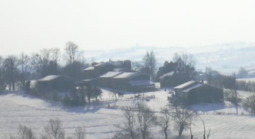 Photographie réalisée par mes soins (Archaons). Photographie du village de Saint-Germier en Haute-Garonne (31), prise en hiver 2004.